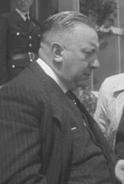 Ministerpräsidenten-Konferenz der Länder der 3 Westzonen Deutschlands auf dem Berghotel Rittersturz in Koblenz 8.-10.7.1948